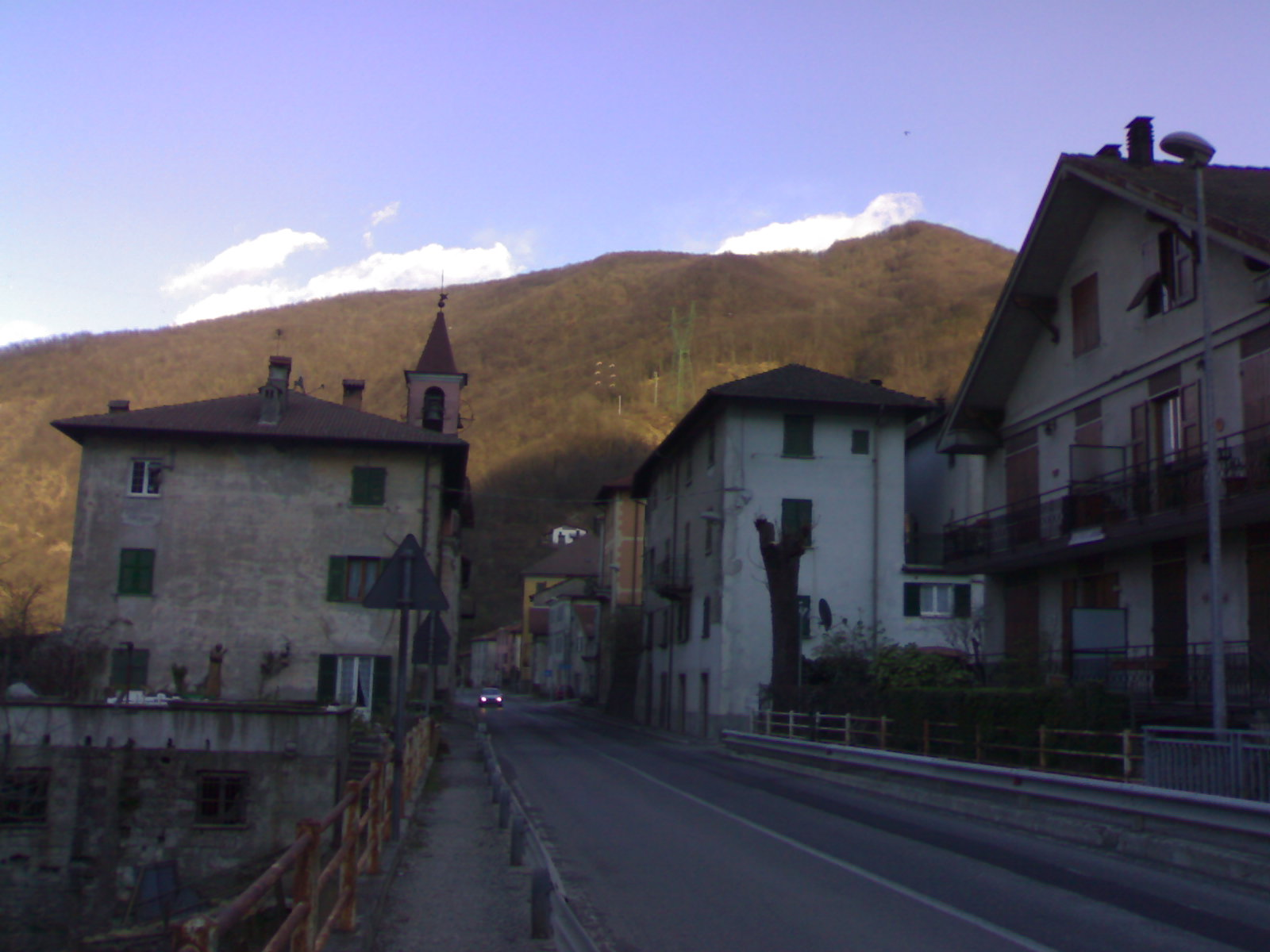 vista della frazione di Pietrabissara, Isola del Cantone (GE)